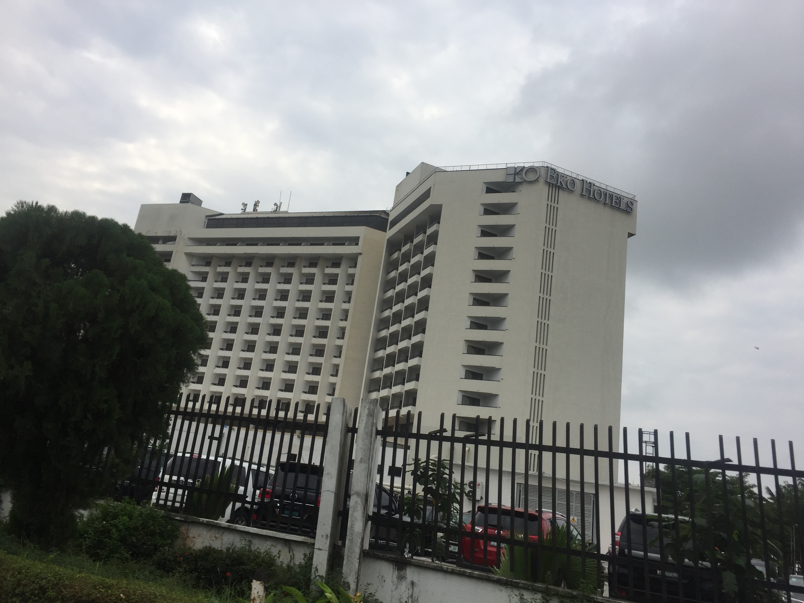 Eko Hotels & Suites, Lagos